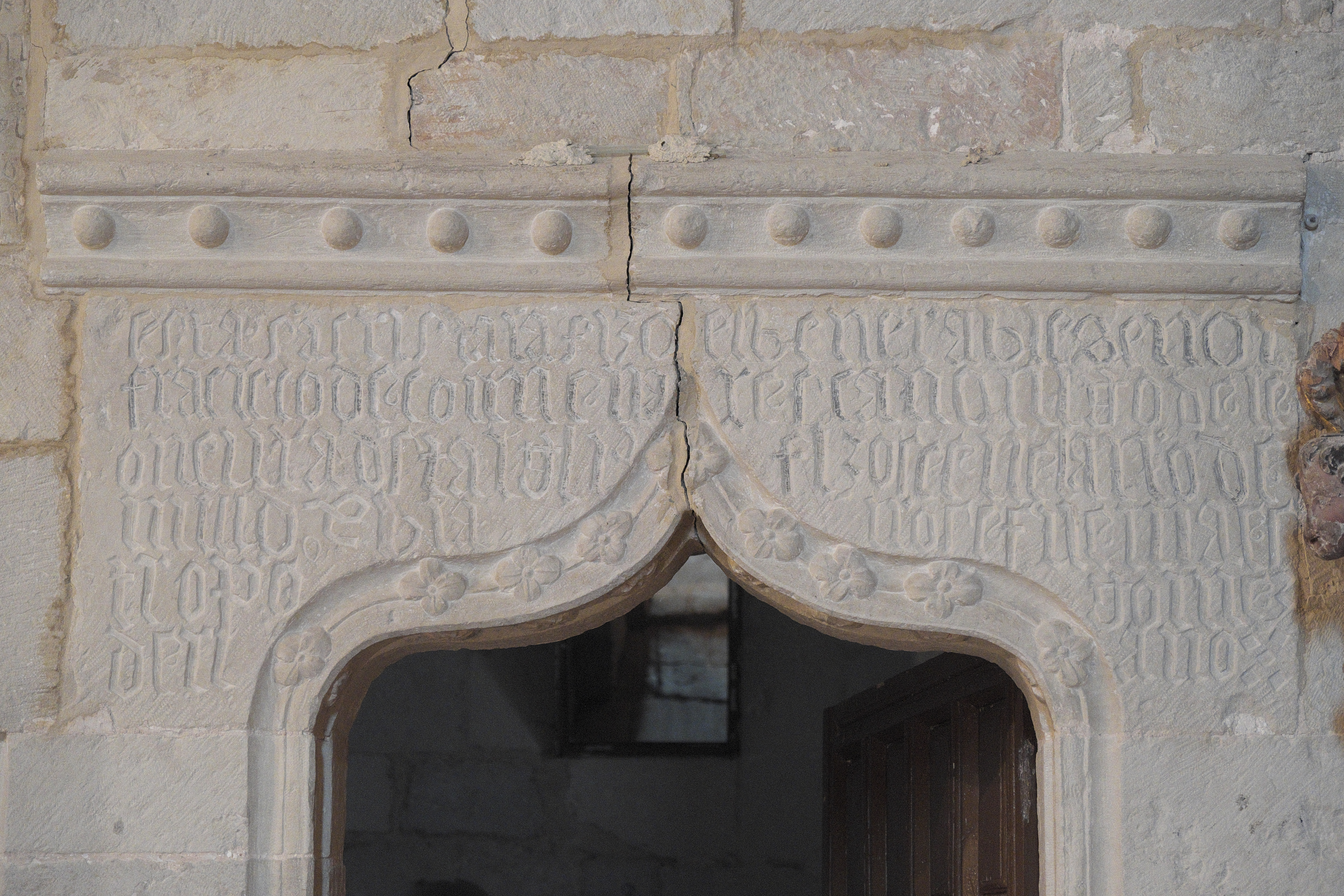 Kirche San Fructuoso Mártir in Colmenares de Ojeda (Dehesa de Montejo) in der Provinz Palencia (Kastilien-León/Spanien), Tür zur Sakristei, mit Kielbogen und Inschrift